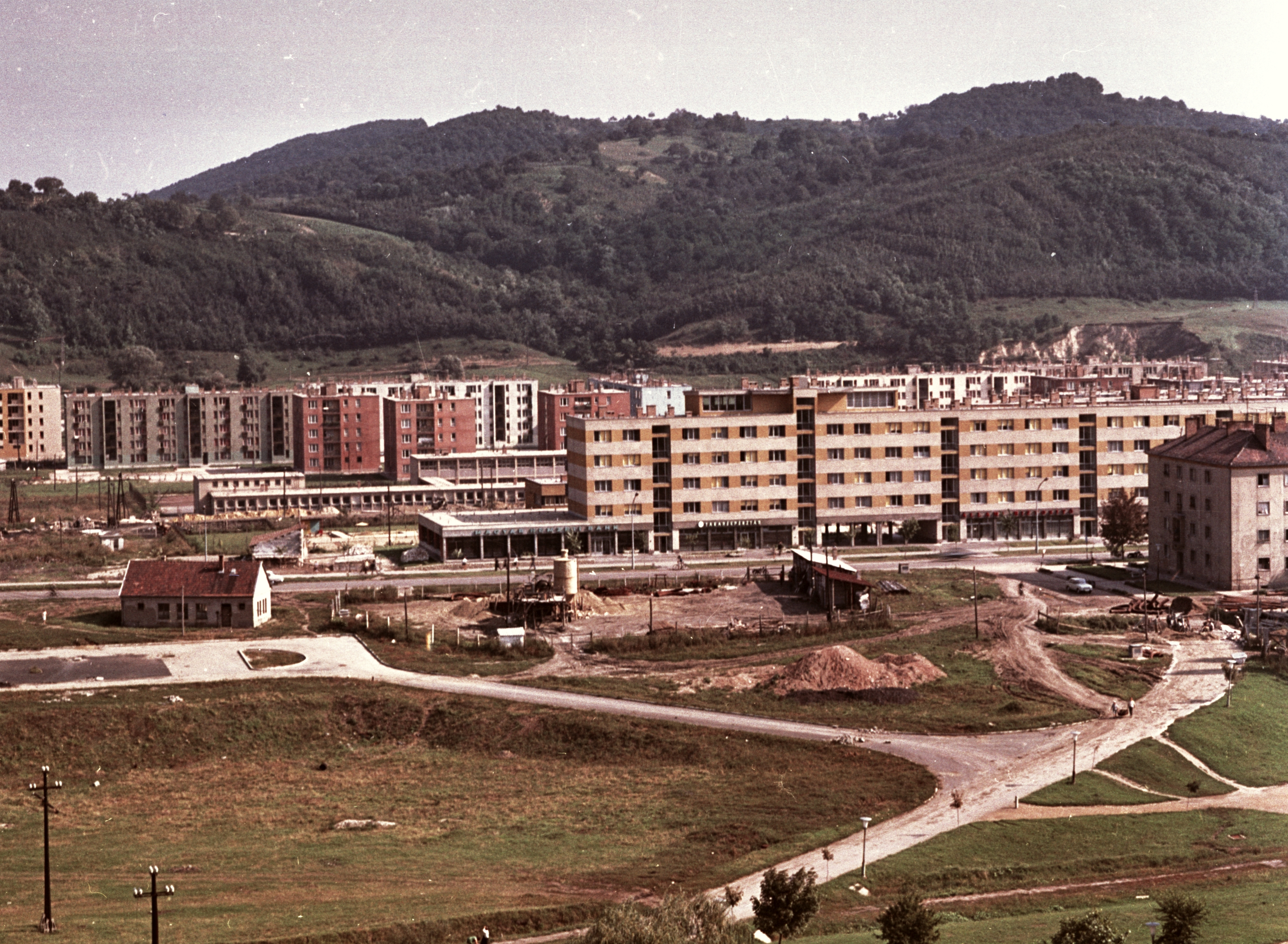 Panorámakép az épülő városról a Városi Kórház tetejéről nézve. Az Egressy Béni (Lenin) út és a Mátyás király út házai. Location: Hungary Tags: picture, colorful, construction Title: Panorámakép az épülő városról a Városi Kórház tetejéről nézve. Az Egressy Béni (Lenin) út és a Mátyás király út házai.